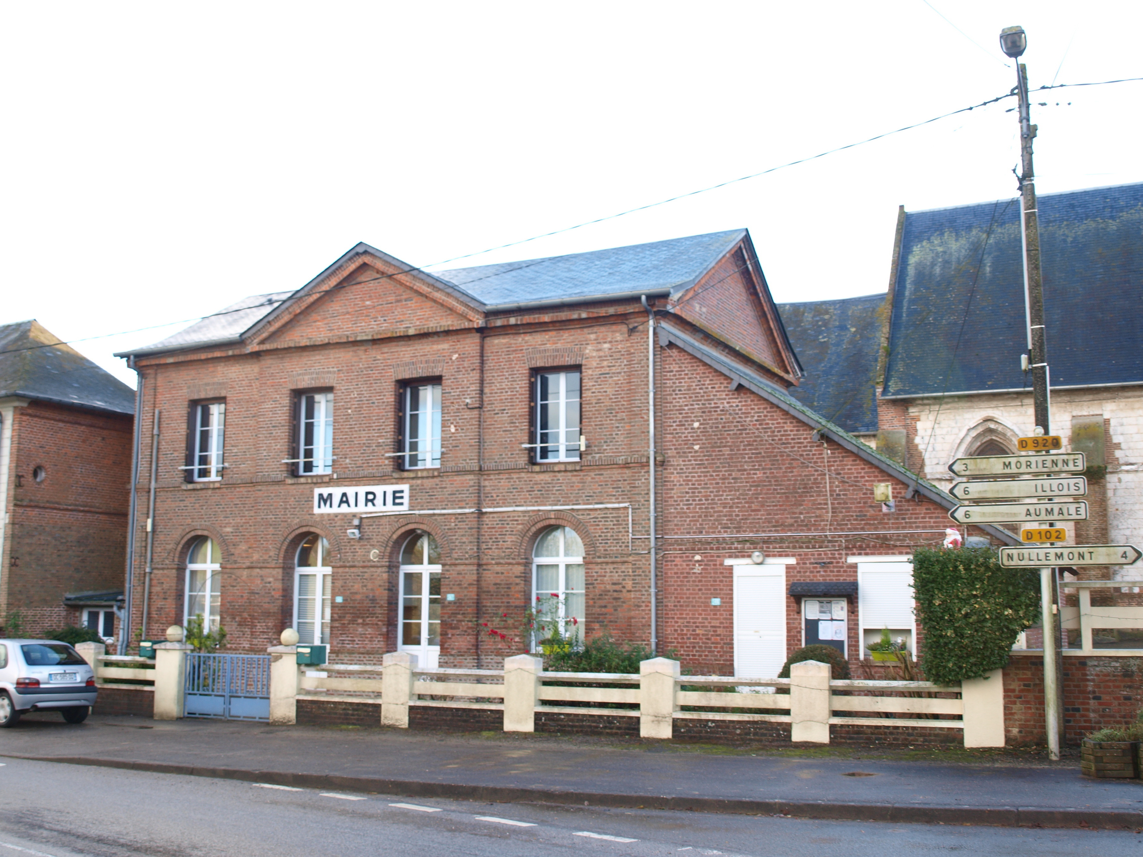 Marques (Seine-Maritime, France) ; mairie & école